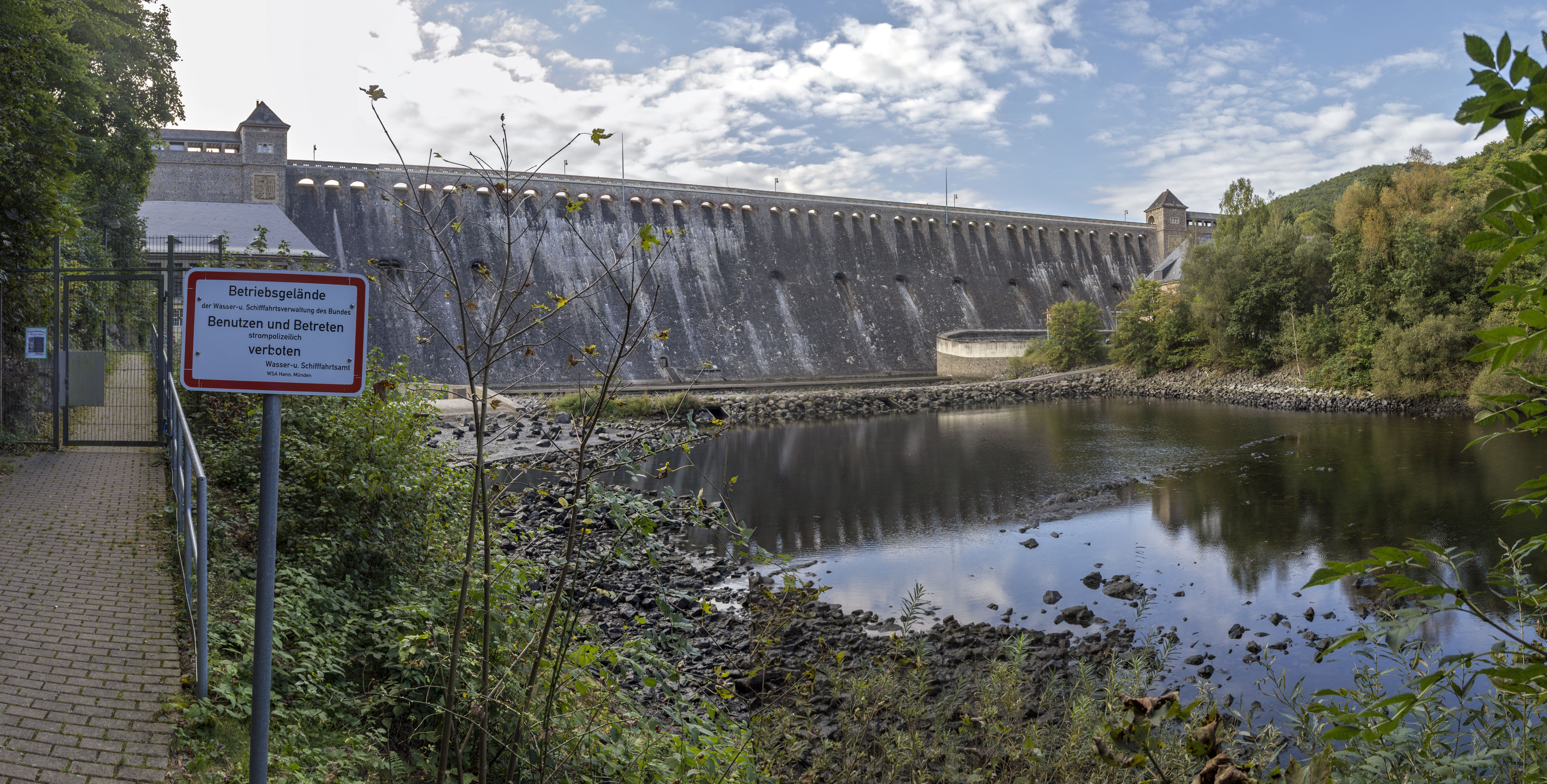 Edersee, Staudam